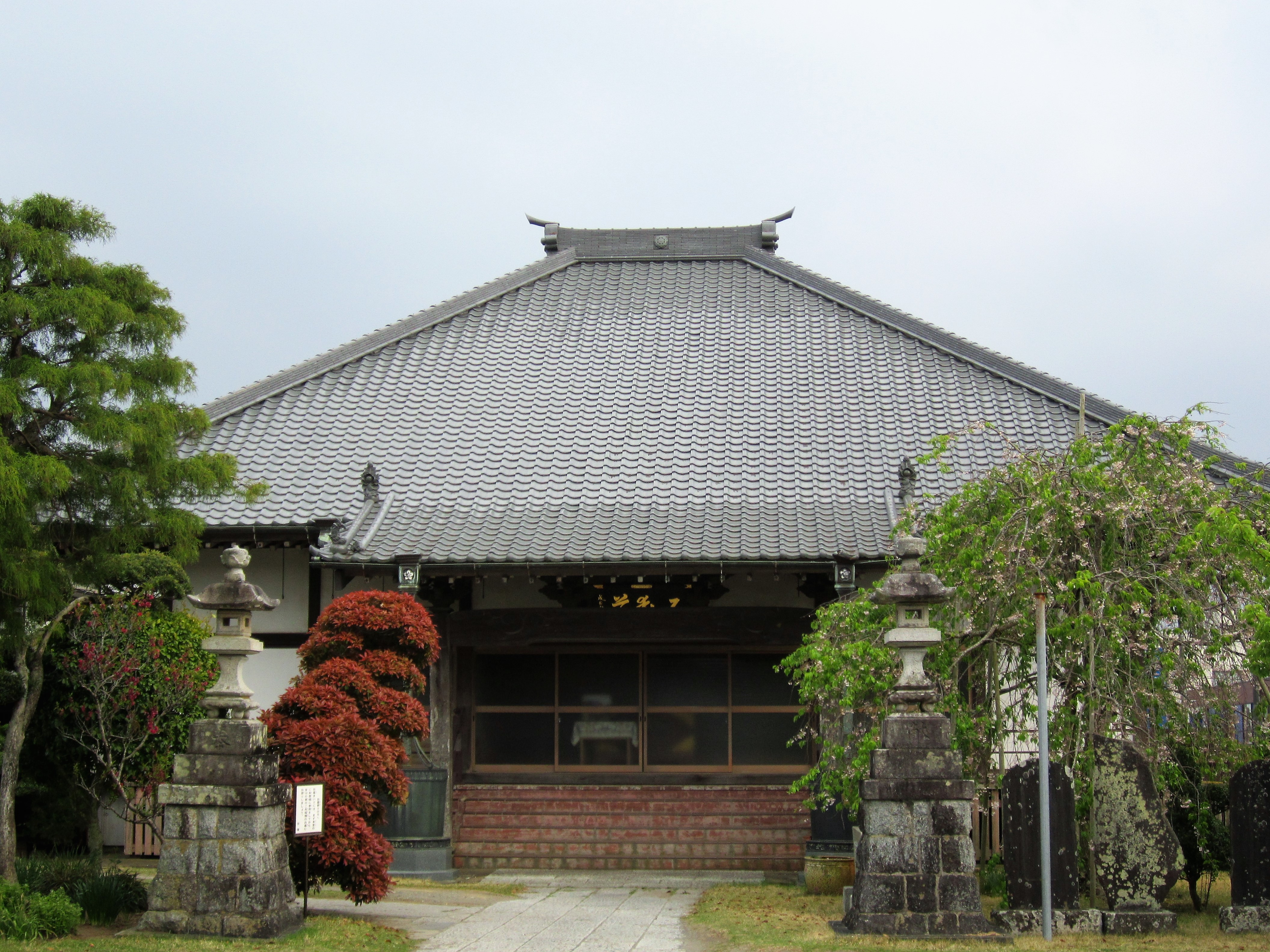 見徳寺（匝瑳市八日市場イ） Canon PowerShot A2200